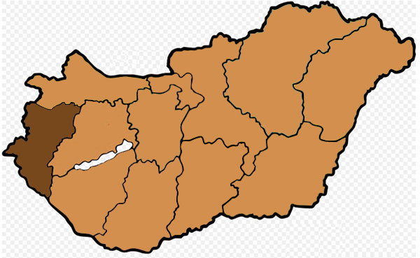 Mappa dell'arcidiocesi cattolica di Szombathely, in Ungheria. Lavoro personale eseguito da questa immagine di Commons.